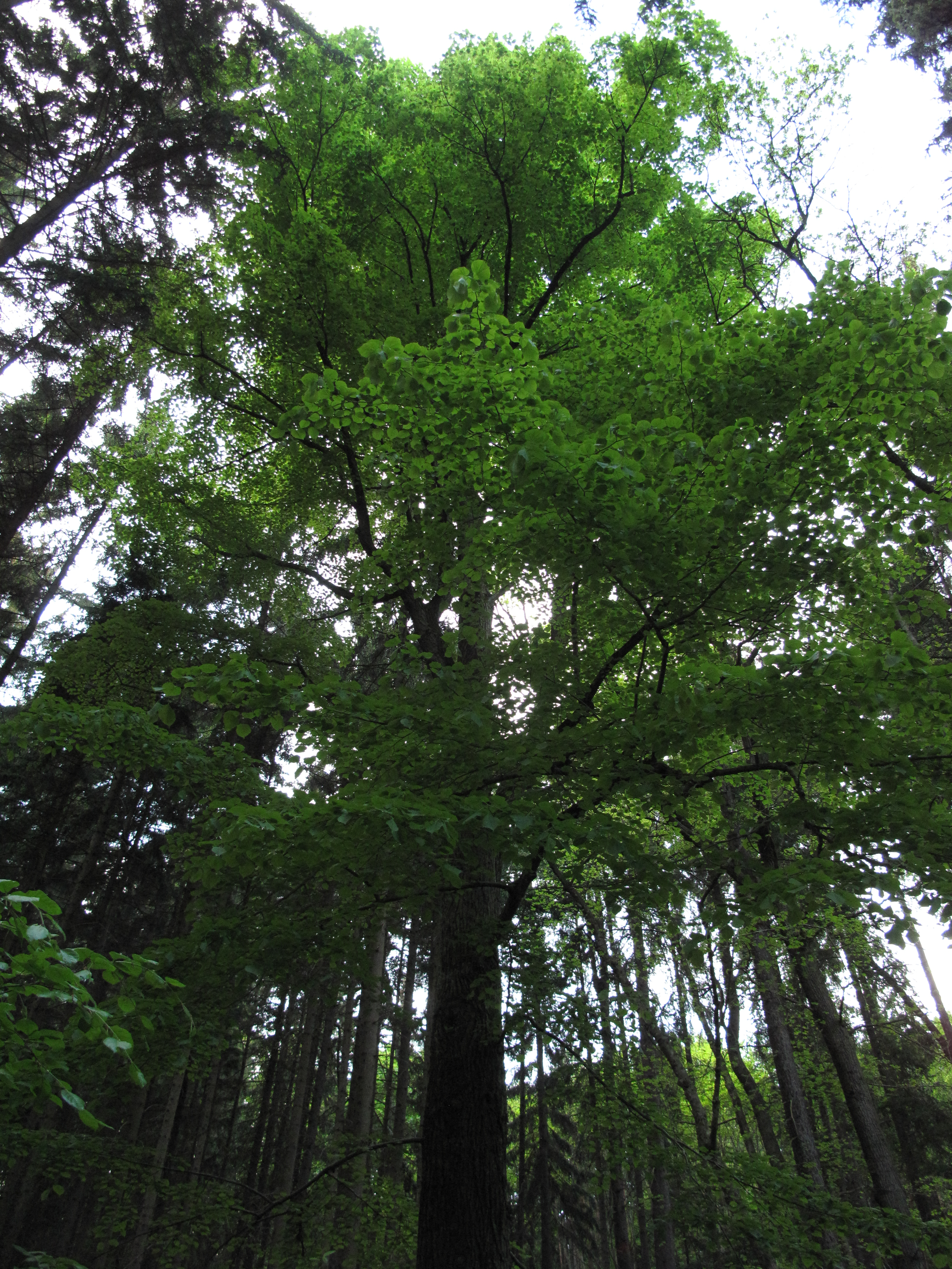 Přírodní památka Ostrov u Jedomělic. Okres Kladno, Česká republika.